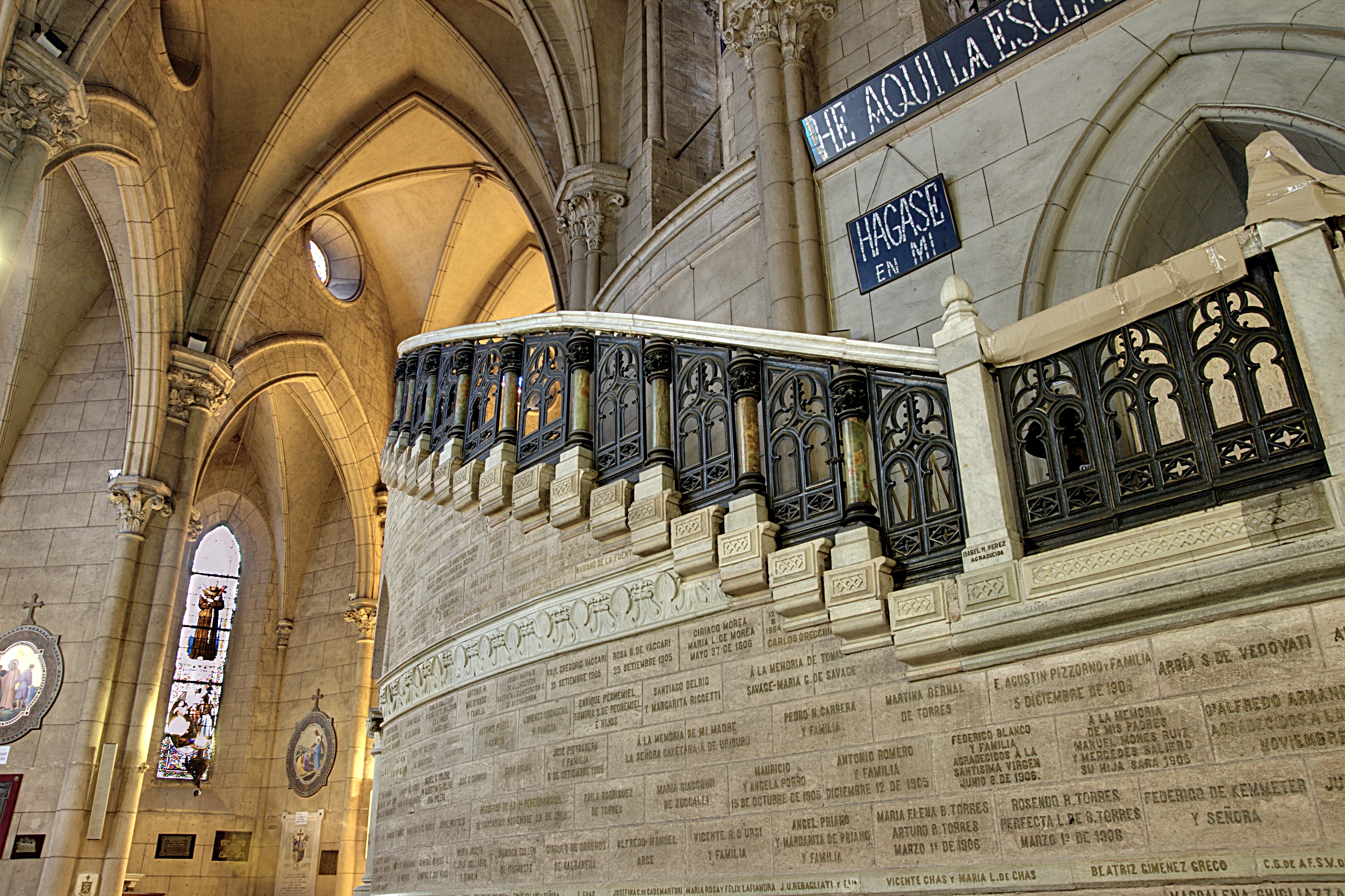 Basílica de Nuestra Señora de Luján, Luján, provincia de Buenos Aires, Argentina.